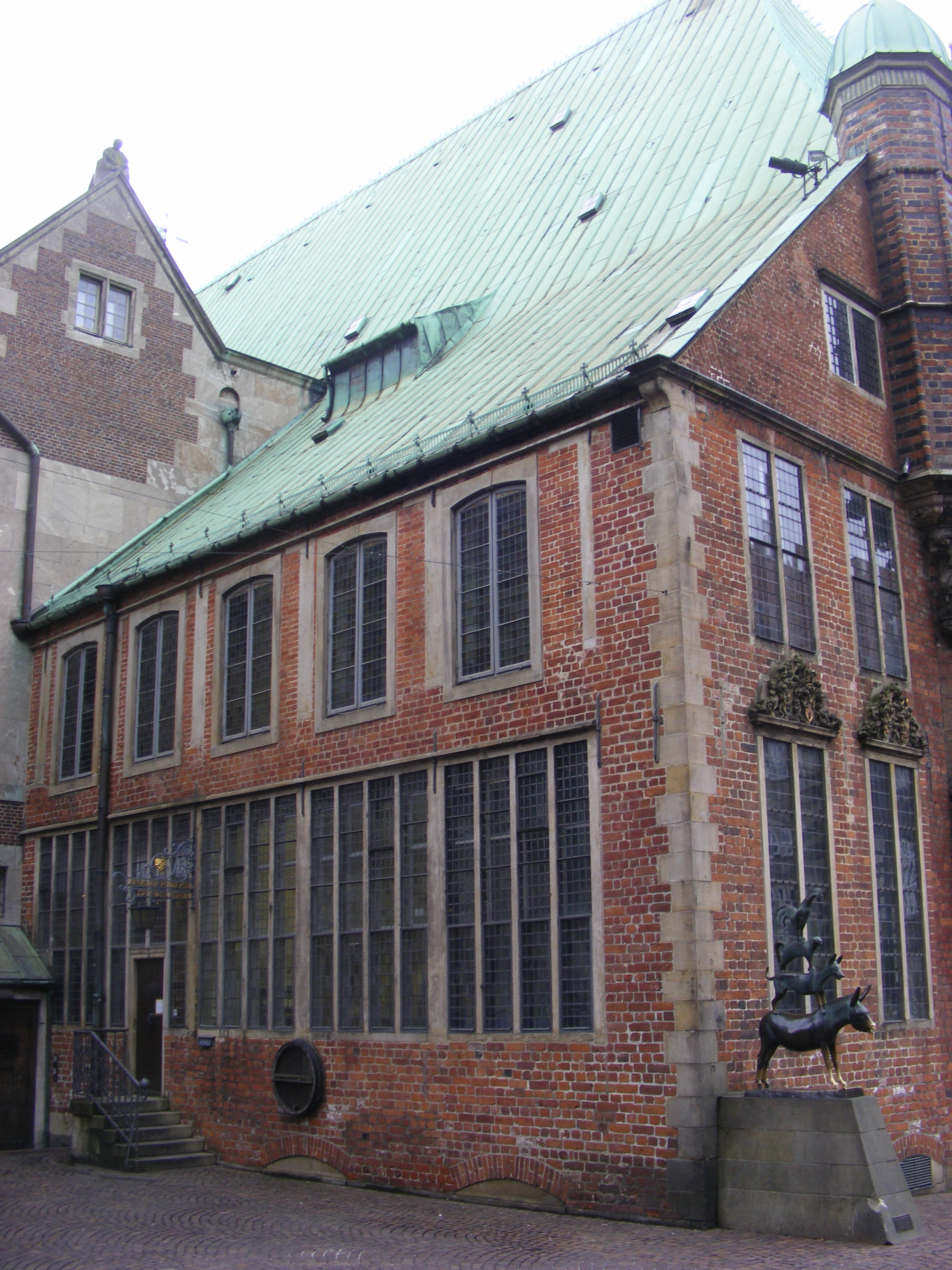 Kanzleianbau von 1682/83 an der Nordecke des Bremer Rathauses, rechts das letzte der urpsrünglich (1404/10) vier gotischen Treppentürmchen, unterhalb die Skulptur der bremer Stadtmusikanten von 1953, links oben ein Giebel des Erweiterungsbaus von 1909/10 (sog. Neues Rathaus)